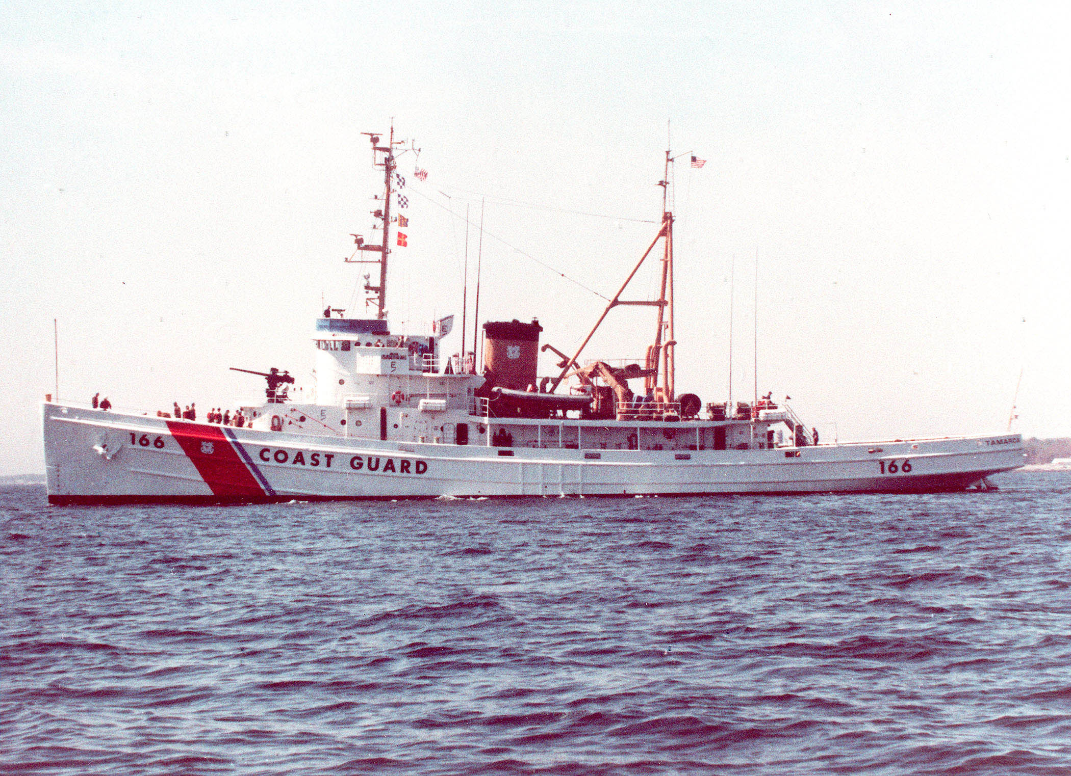 USCGC_Tamaroa (WUEC 166)